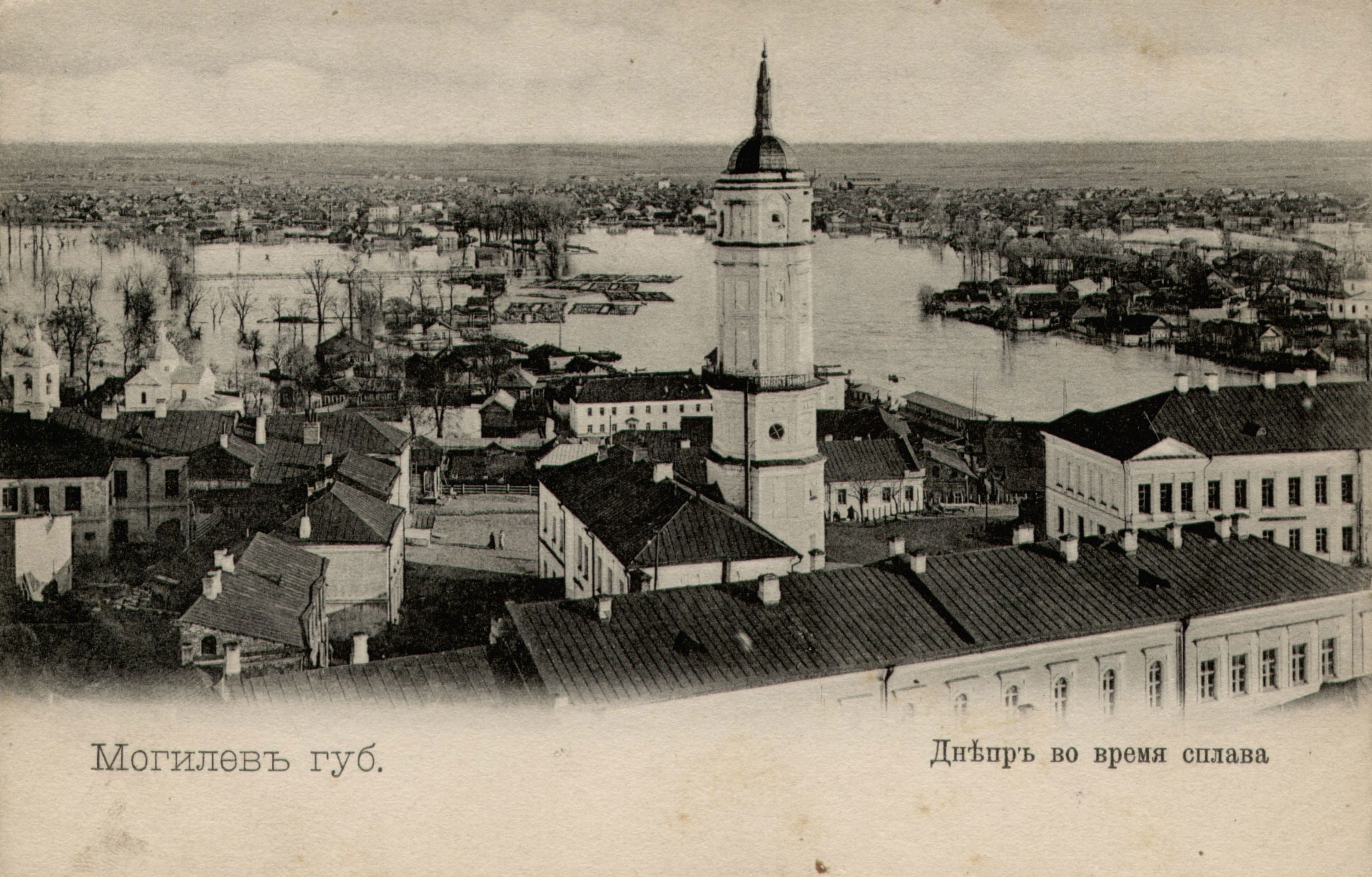 Беларуская (тарашкевіца): Магілёў (Mahiloŭ), рака Дняпро (Dniapro) з боку пляцу Рынку (plac Rynak)